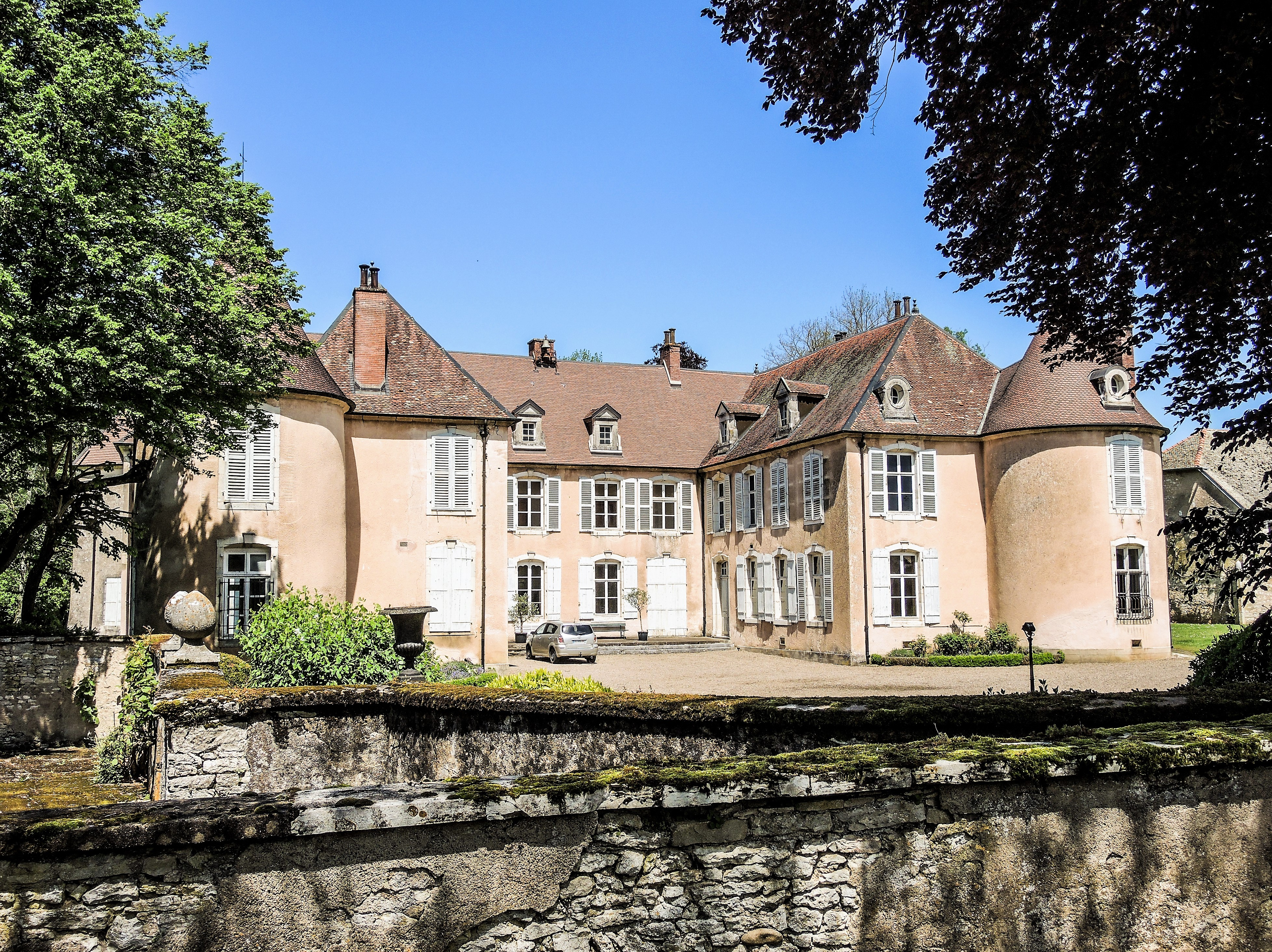 Façade du château, vue de la route.